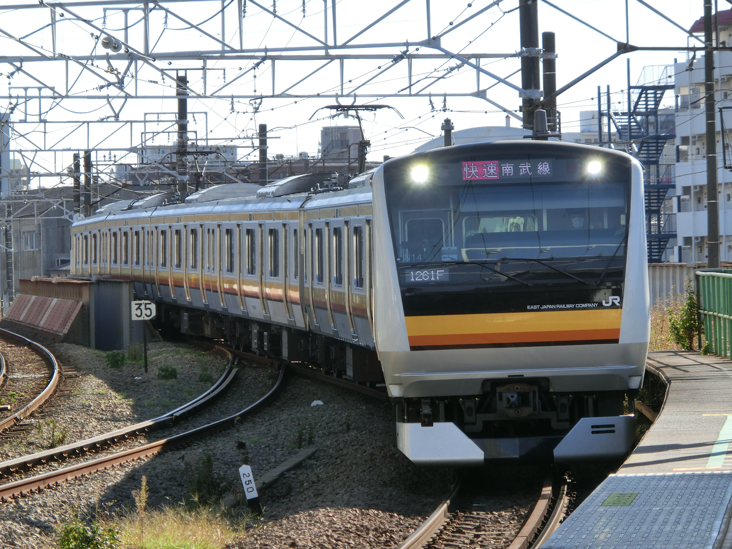 尻手駅に入線するE233系